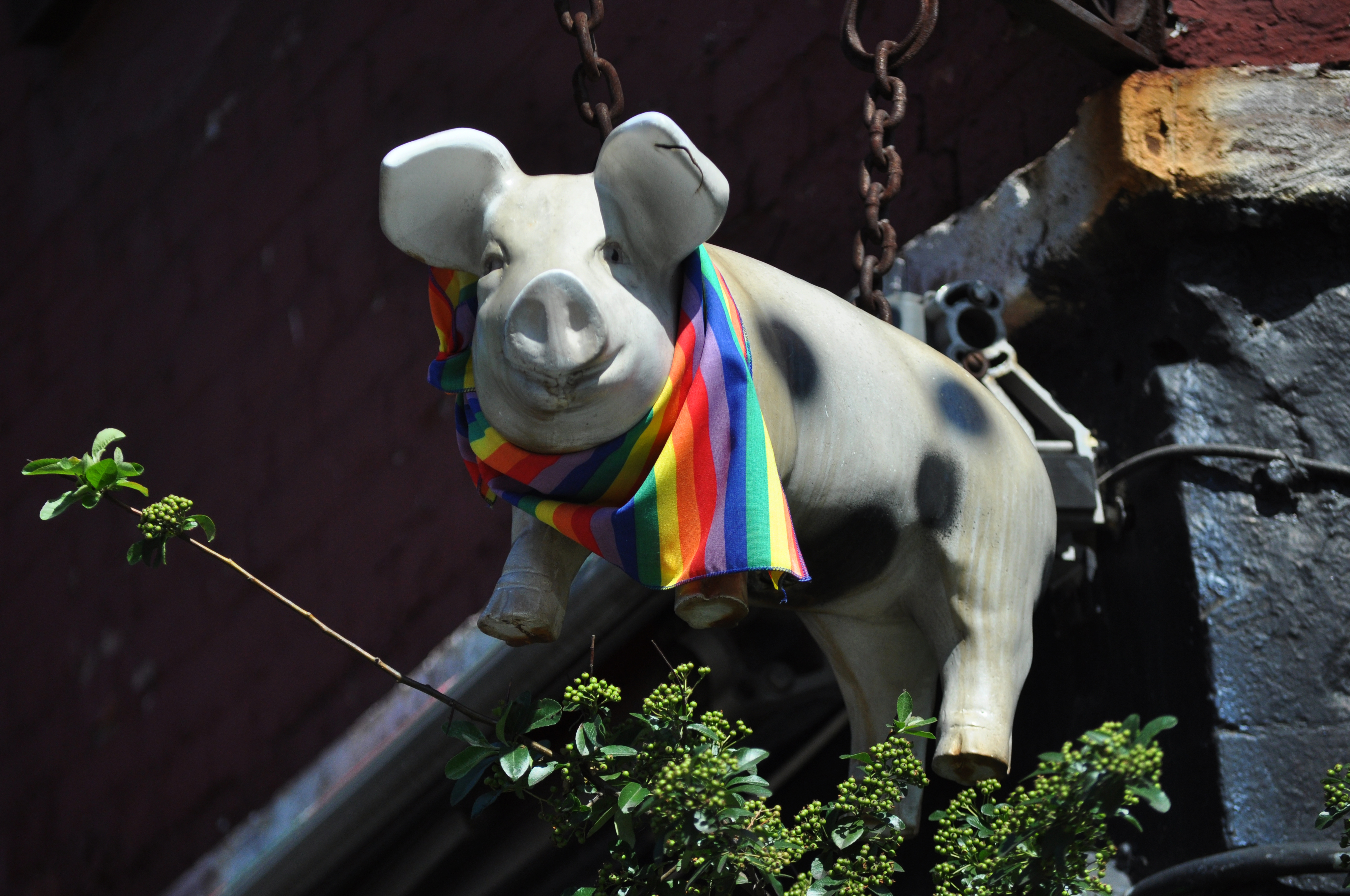 West Village, NYC